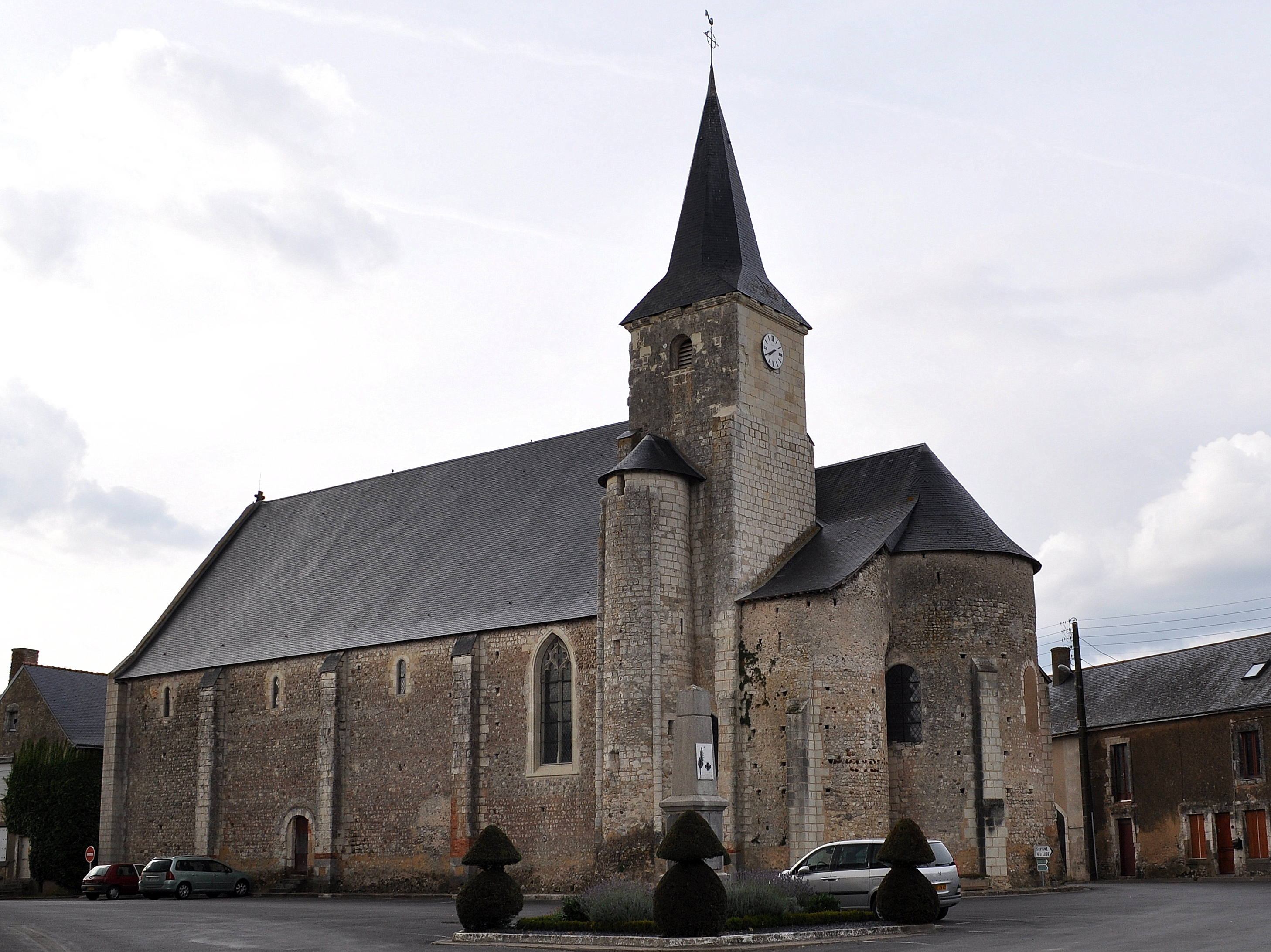 Eglise Saint-Martin de Genneteil (Maine-et-Loire) .